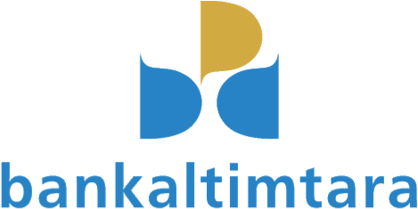 Ini adalah logo resmi utama PT Bank Pembangunan Daerah Kalimantan Timur dan Kalimantan Utara.